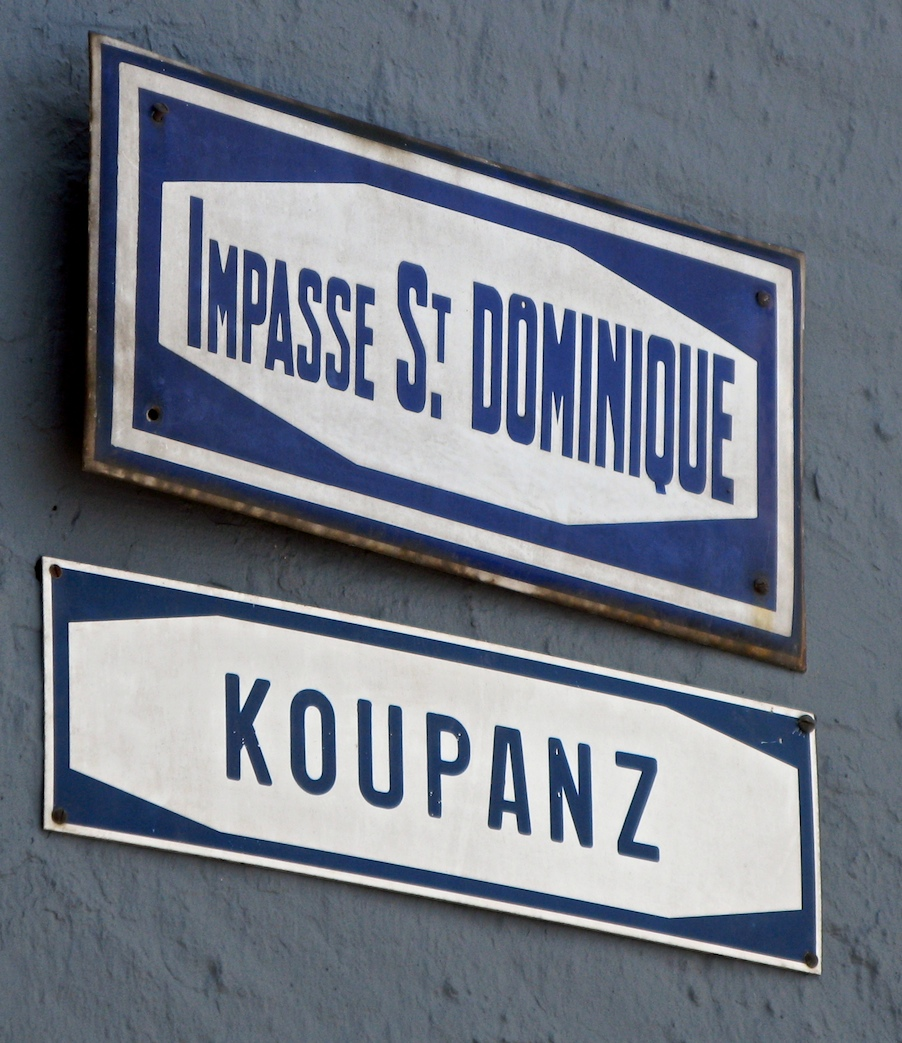 Stroosseschëld, Réimech Koupanz